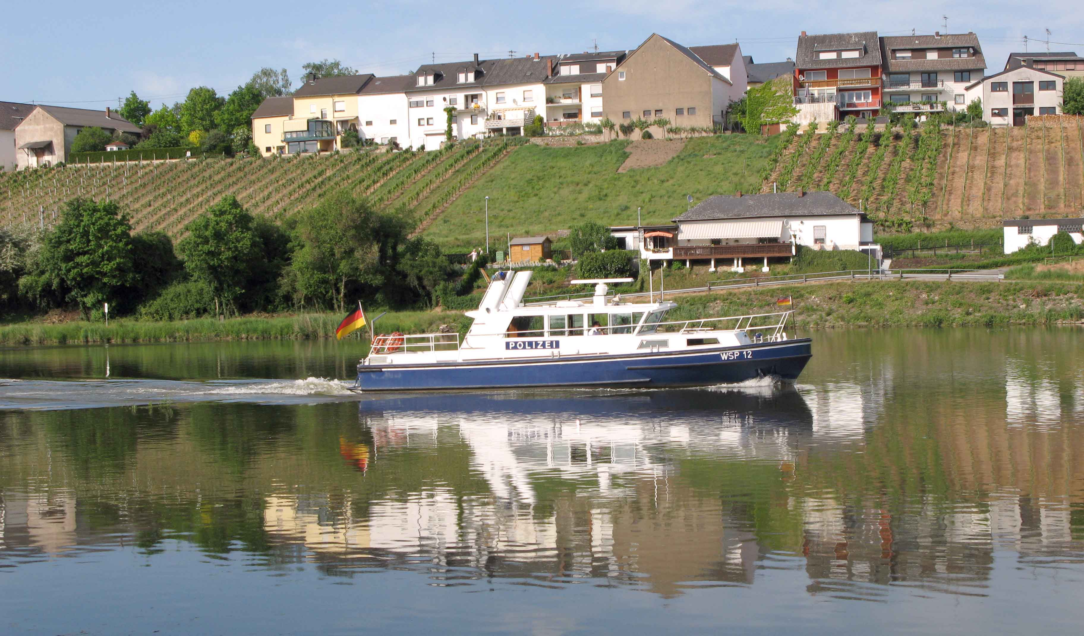 WSPol